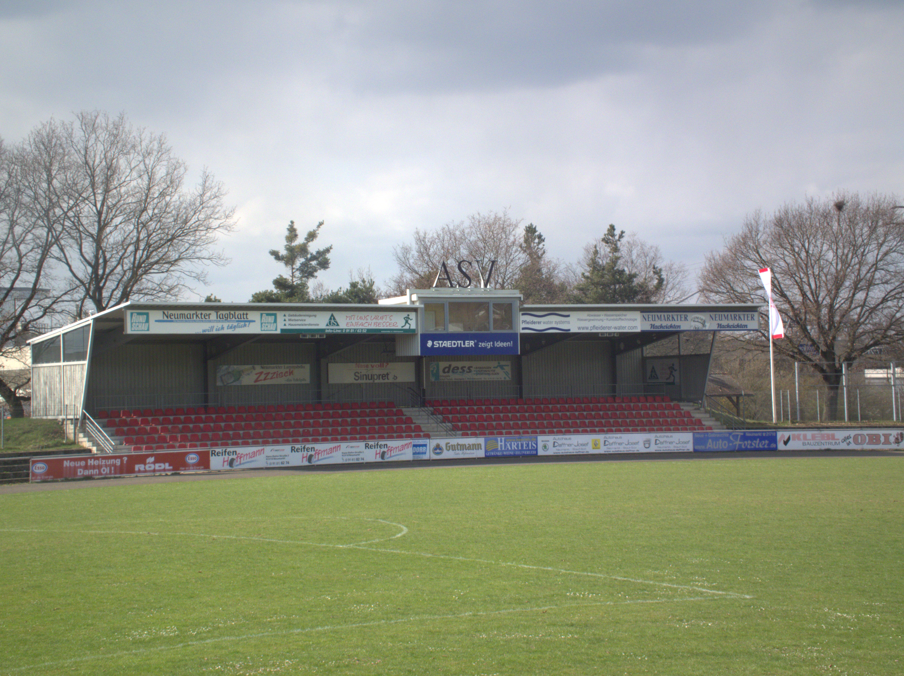 Haupttribüne Stadion ASV Neumarkt Sportzentrum am Deininger Weg 78